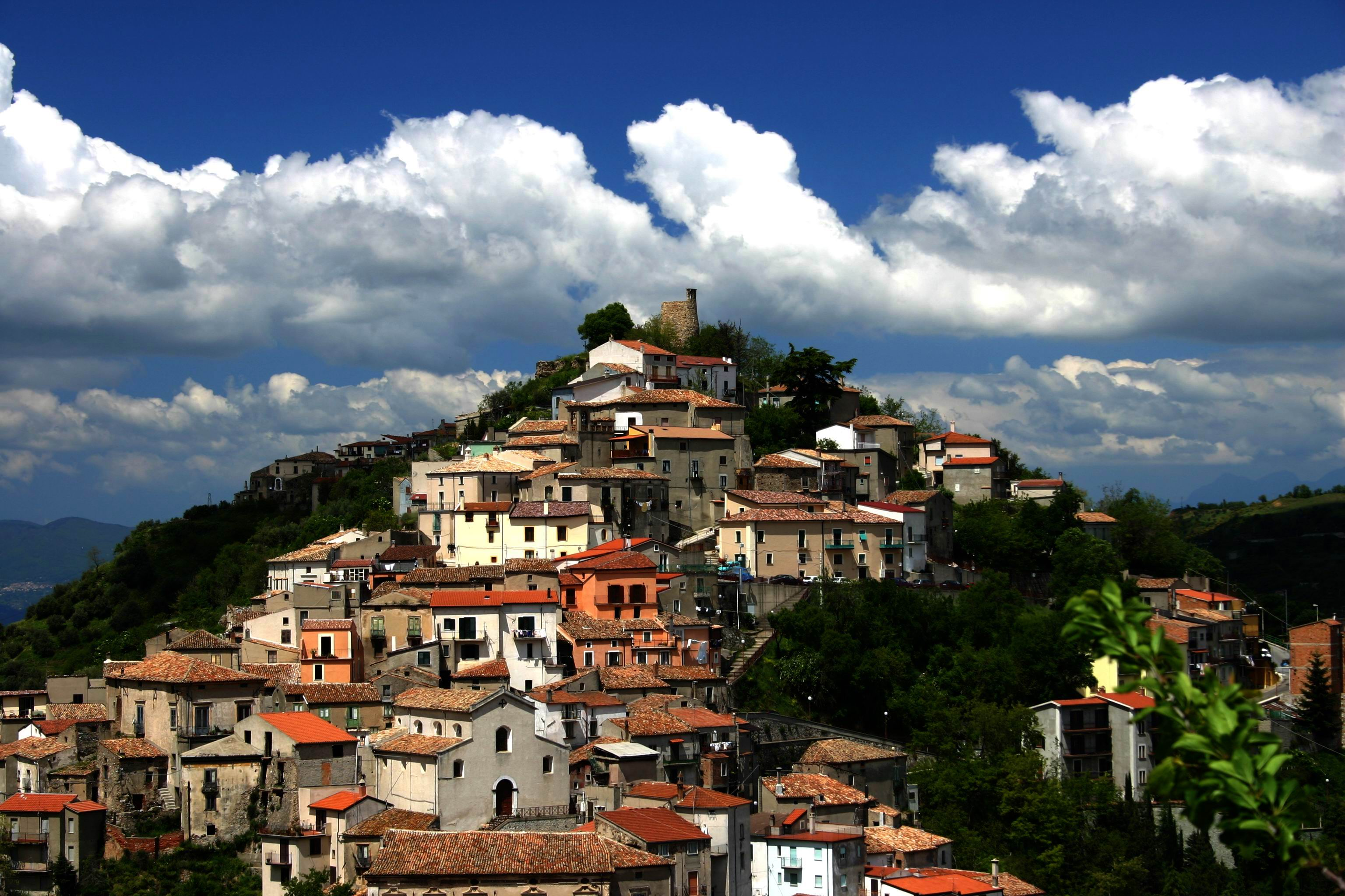 Veduta del centro storico di Acri. I quartieri di Picitti (quartiere dei Greci), Santa Croce e Odivella (luogo dove nasce l'uva selvatica).